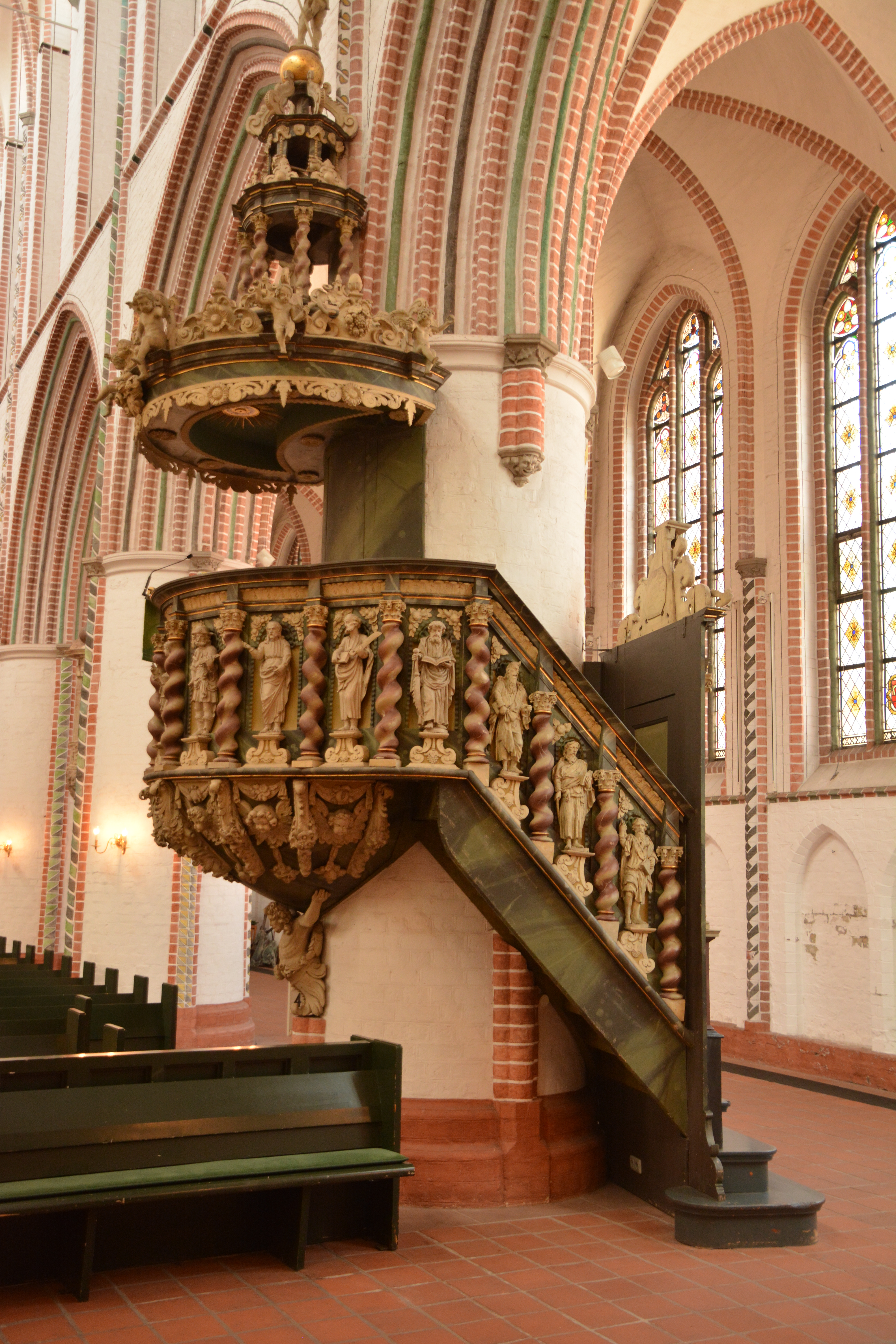 Kanzel St. Petri Buxtehude